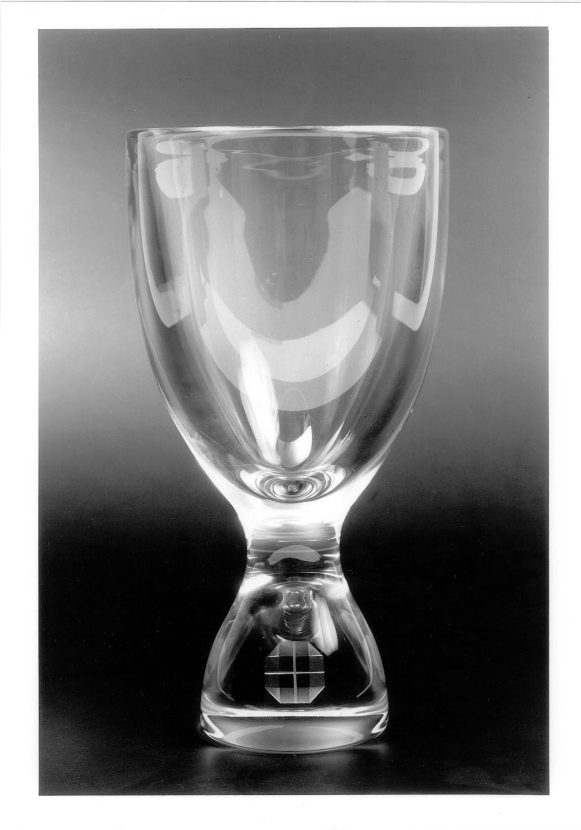 Ontwerp: Willem van Oyen sr., uitvoering: Glasfabriek Leerdam.